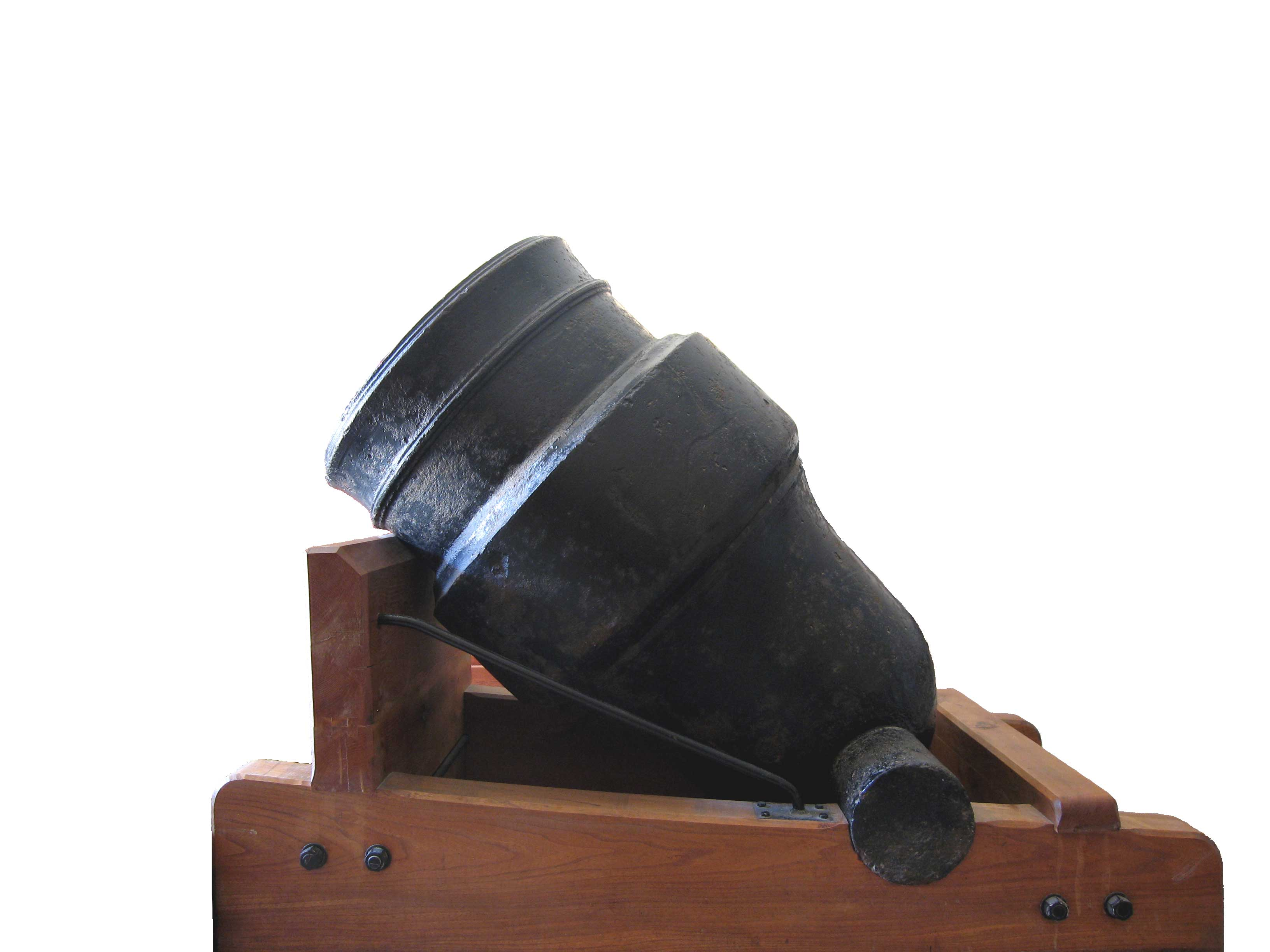 Description : Mortier russe de 100mm du début du 20 ème siècle Place : Musée de Port Louis, Bretagne, France Date : 2006 Auteur : Pline